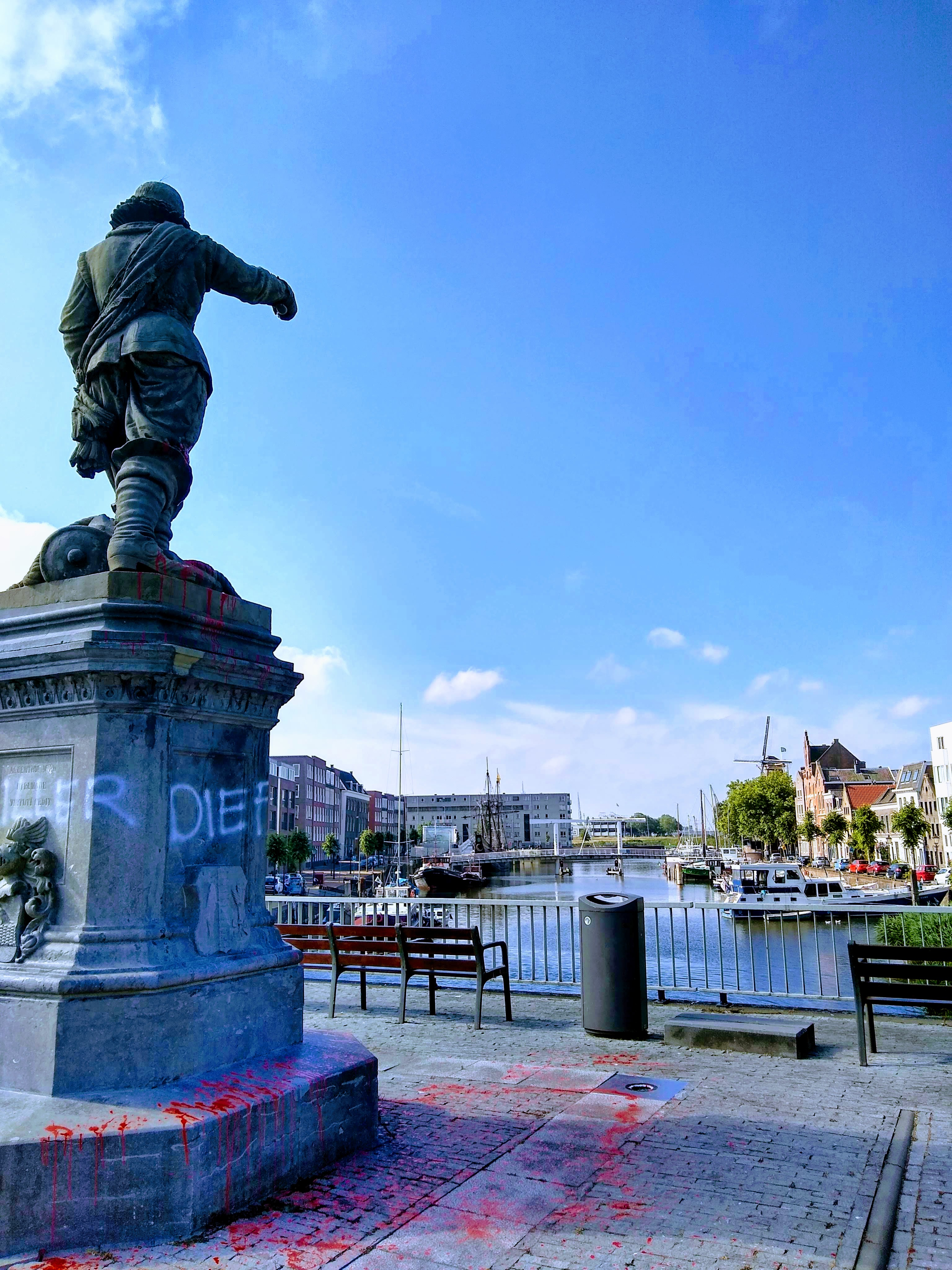 Het standbeeld van Piet Hein (op de rug gezien) in Historisch Delfshaven beklad met leuzen. Op de achtergrond het V.O.C.-Zeemagazijn en het replica V.O.C.-schip de Halve Maen.